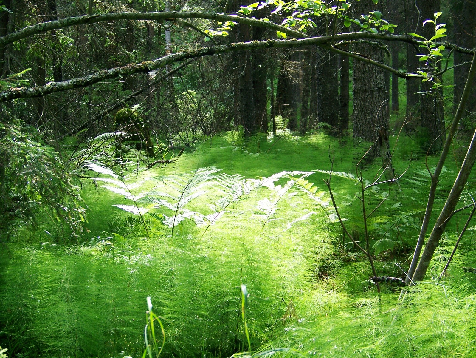 Horsetails at Skuleskogen National Park